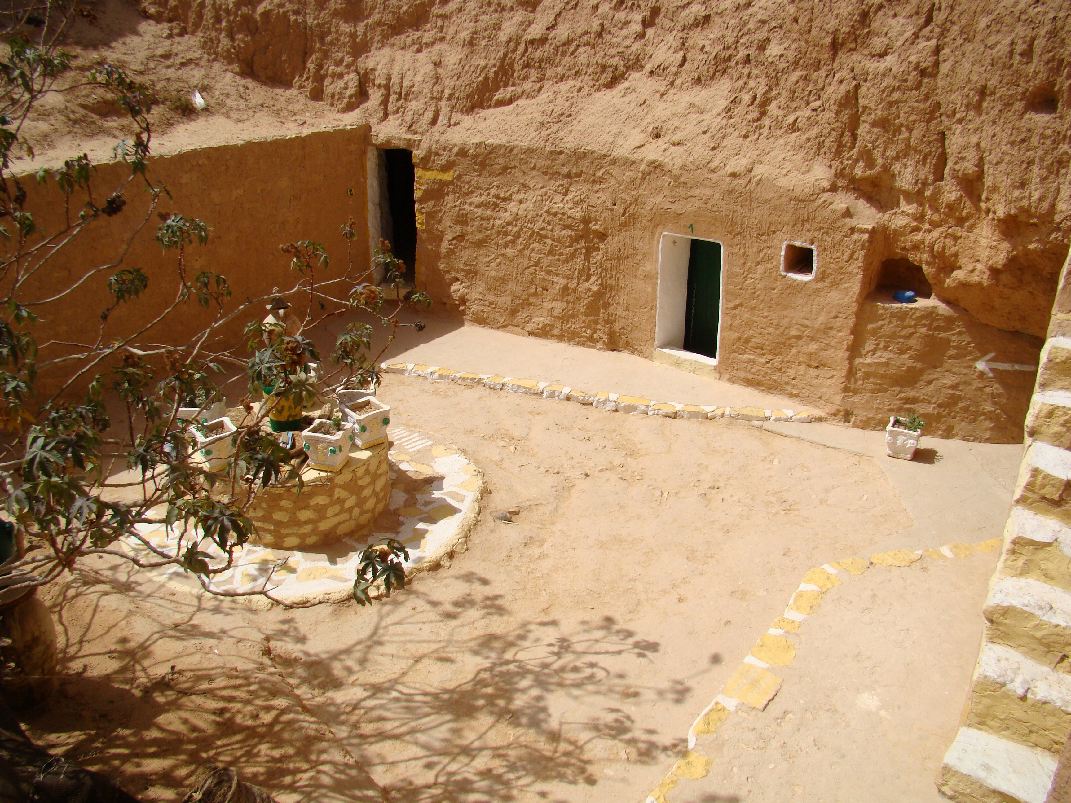 Cour d'une maison troglodytique à Matmata